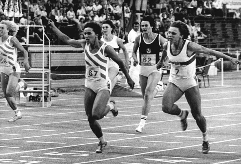 Marlies Göhr, Marita Koch ADN-ZB Gahlbeck 10.8.85 Leipzig: DDR-Meisterschaften der Leichtathletik- Erwartungsgemäß gewann Marlies Göhr (SC Motor Jena, 2.v.l.) am 9.8. über 100 m ihren neunten Titel. Sie lief 10,94 sec und verwies Marita Koch (SC Empor Rostock, r., 10,97 sec) auf den zweiten Platz.